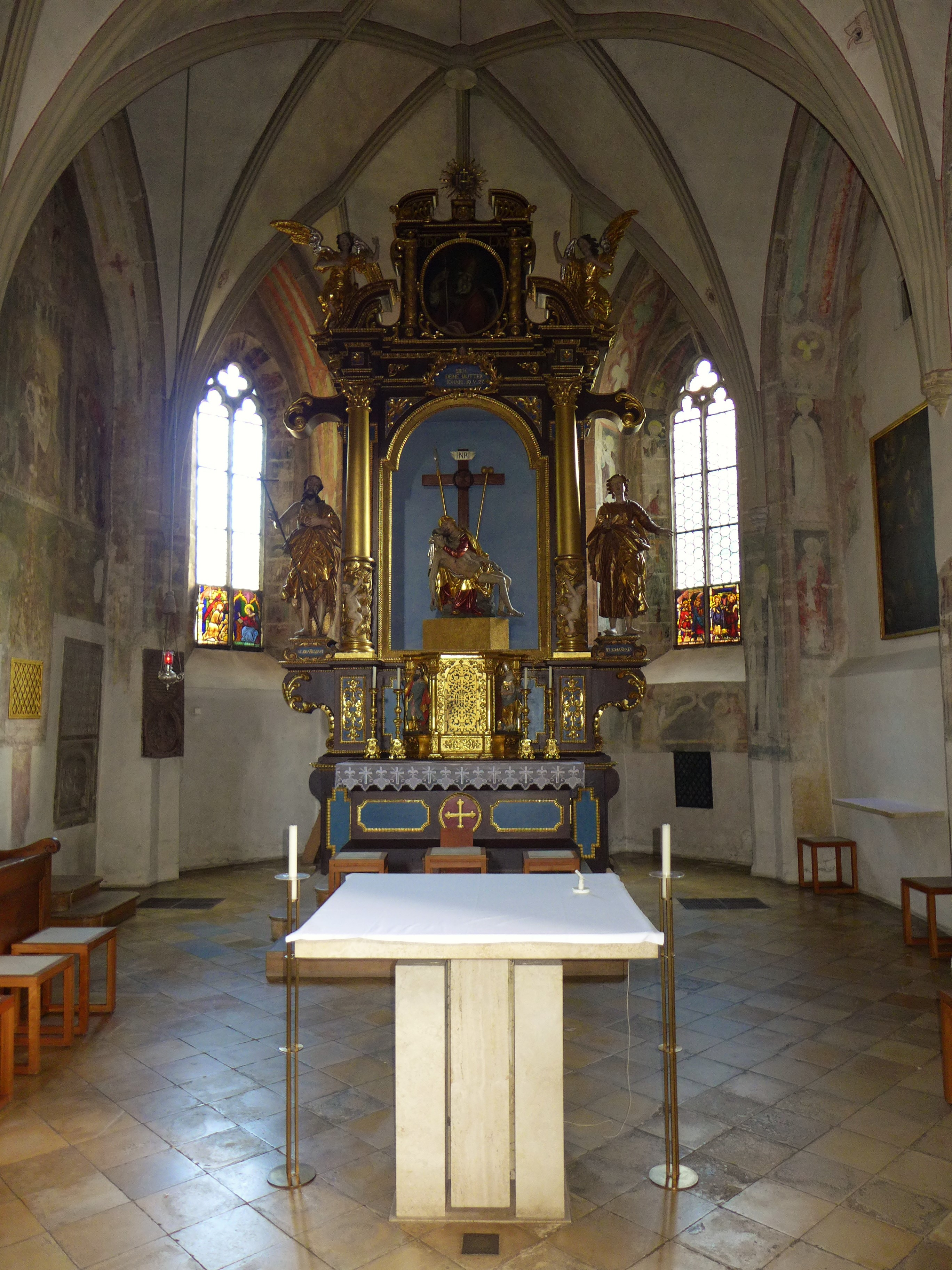 Alte Pfarrkirche St. Martin (Garmisch-Partenkirchen), Blick in die Apsis mit dem Zelebrations- und dem Hochaltar